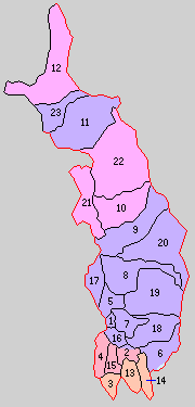 青森県北津軽郡の町村。